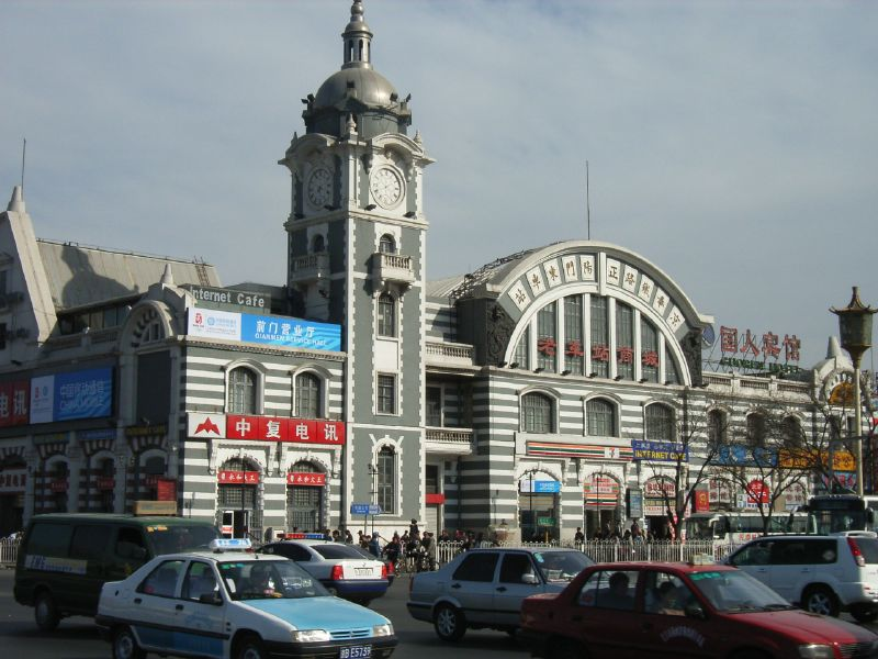 2006年的京奉铁路正阳门东车站，时为“老车站商城”